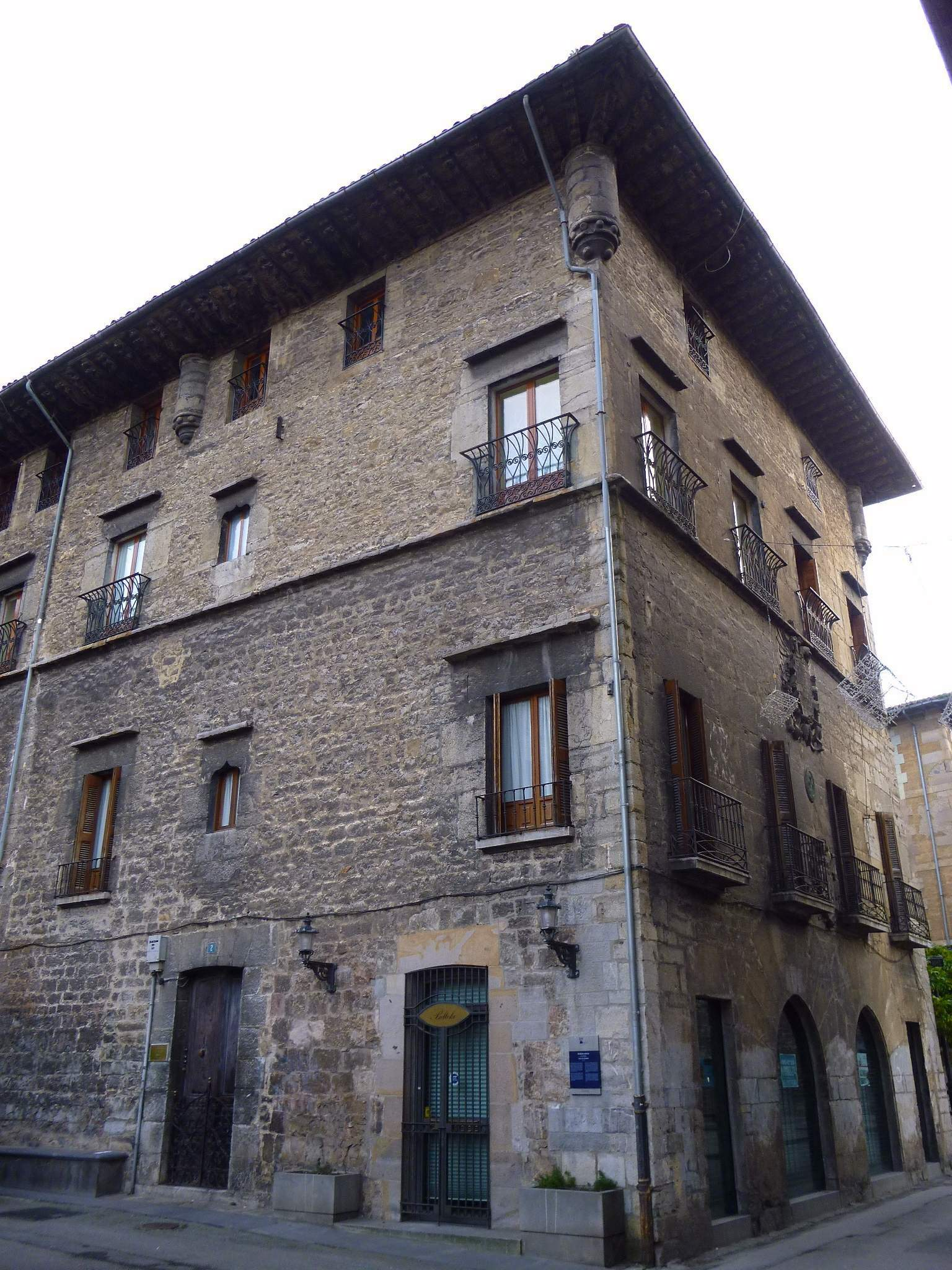 Bergara - Torre de Ondartza